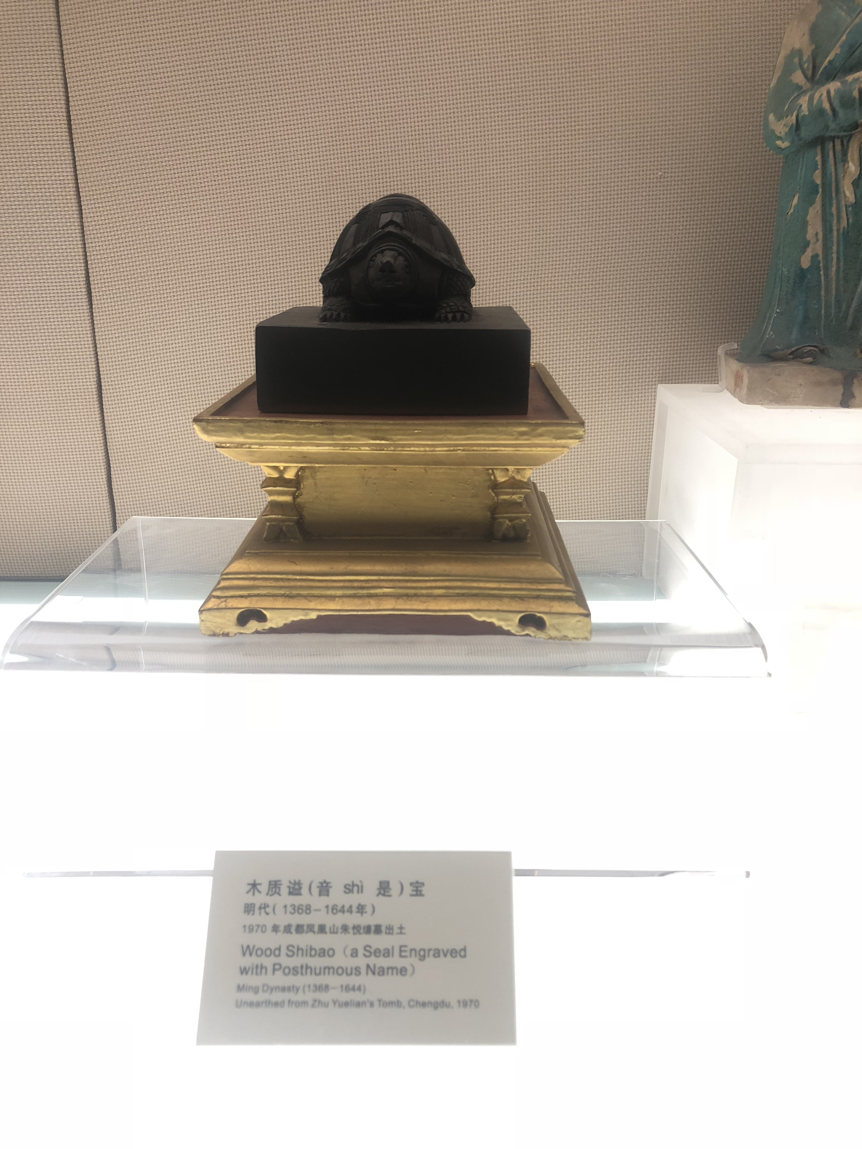 中文（台灣）: 悼莊世子墓文物